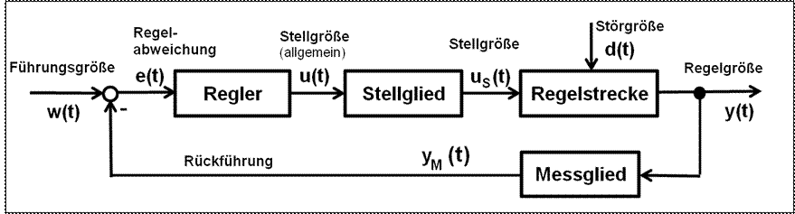 Blockschaltbild eines einfachen erweiterten Regelkreises